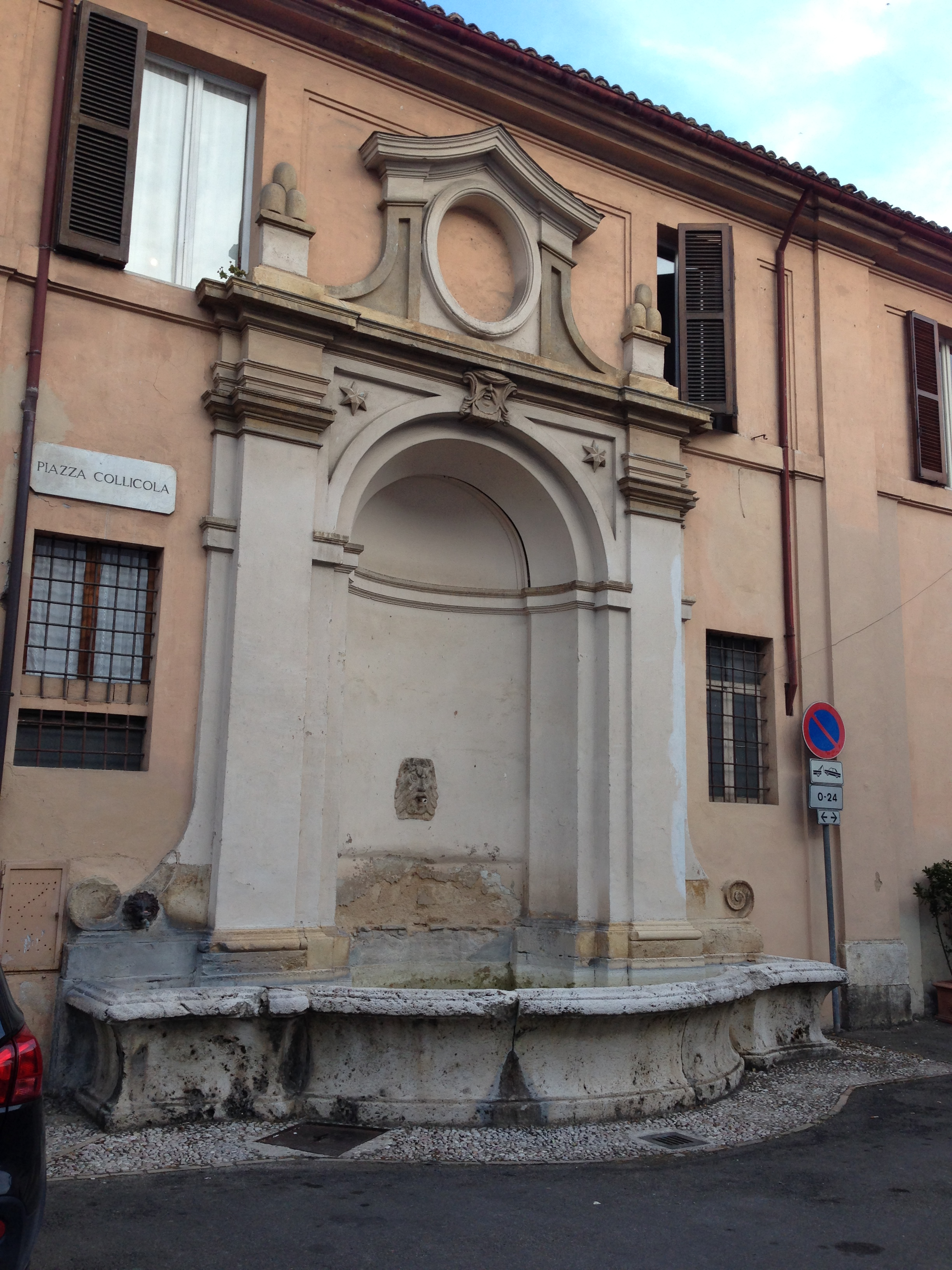 fontana di piazza Collicola. Spoleto